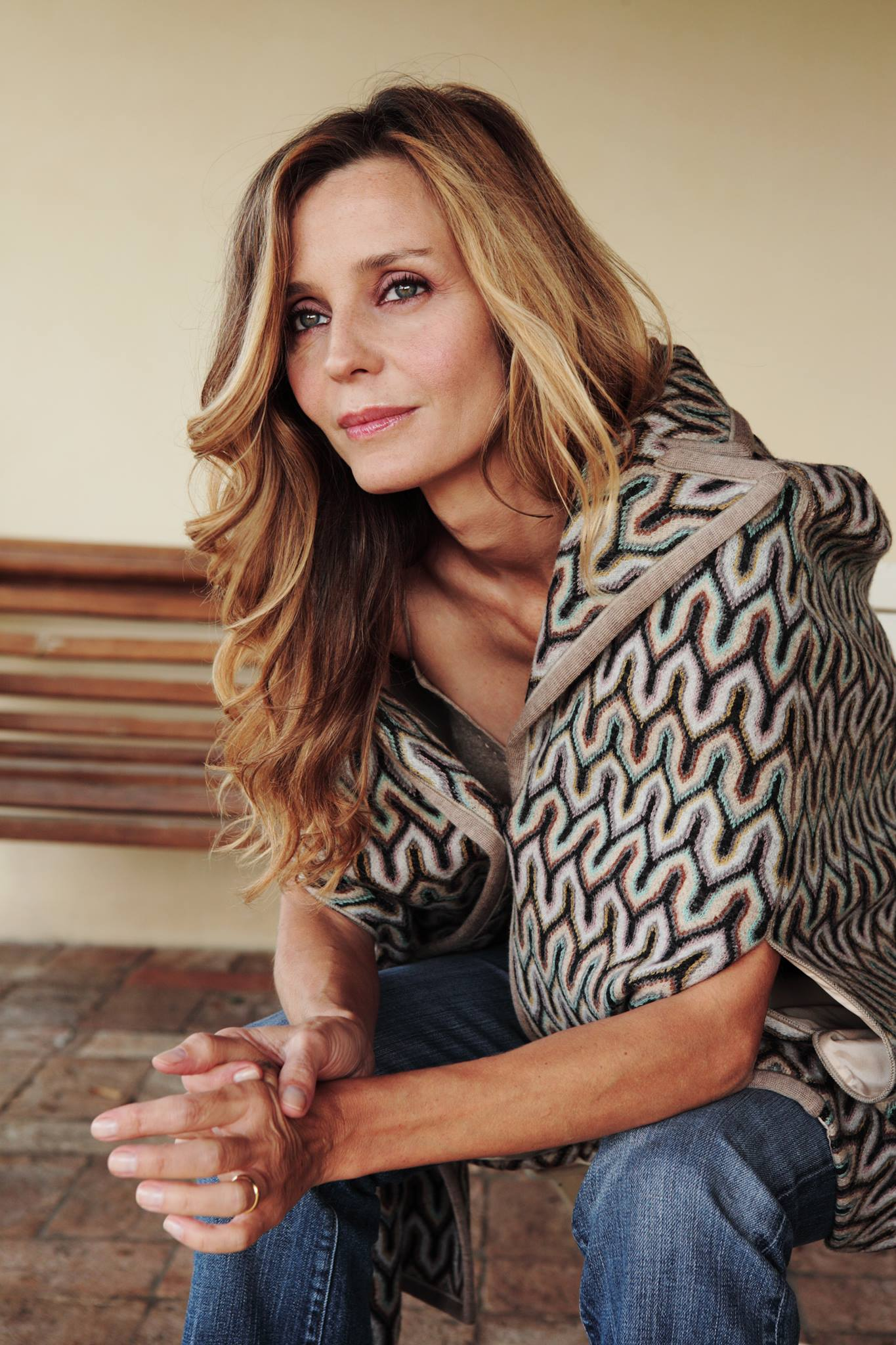 Foto personale di Eliana Miglio